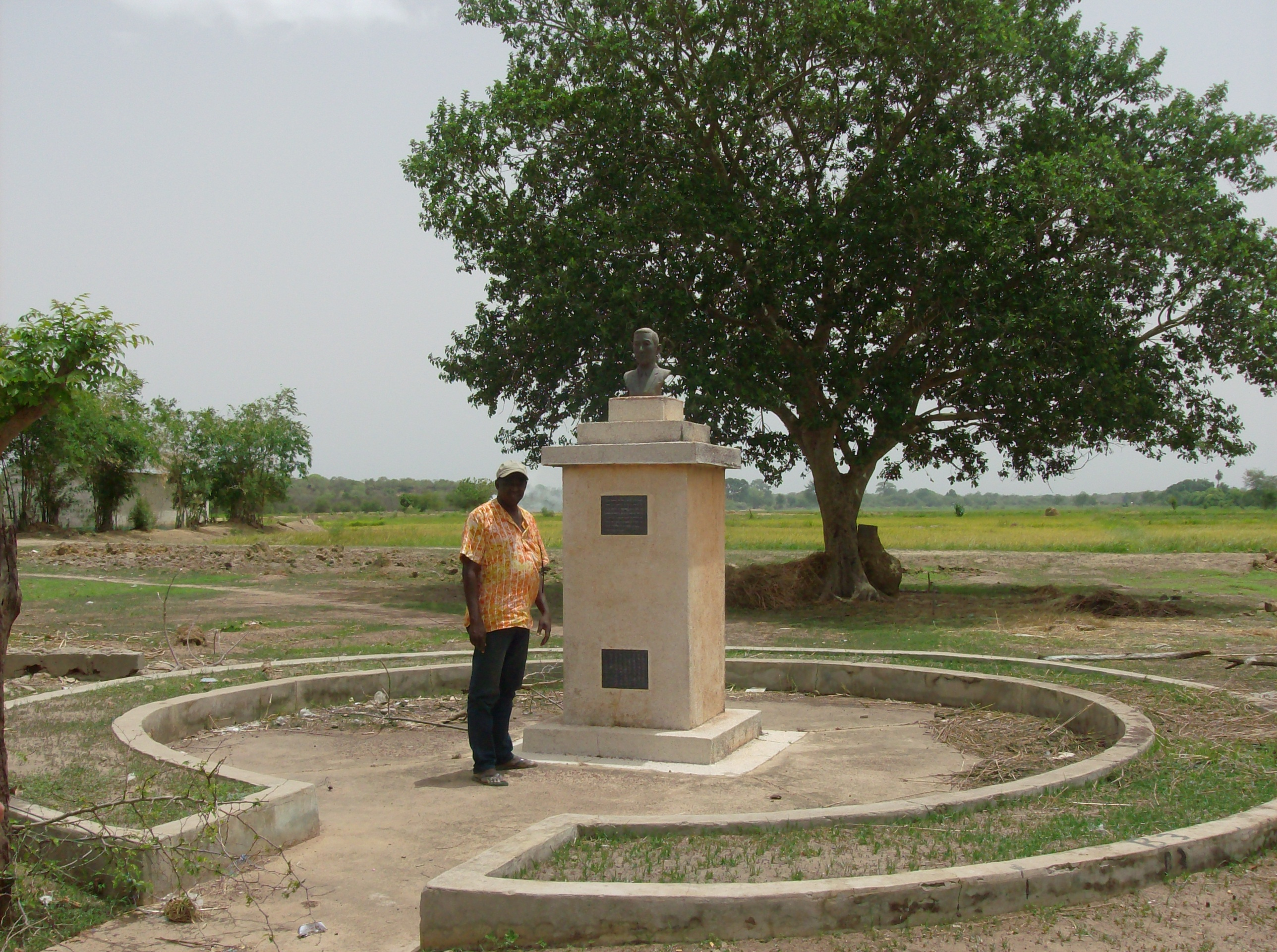 Gambia & Senegal 2009